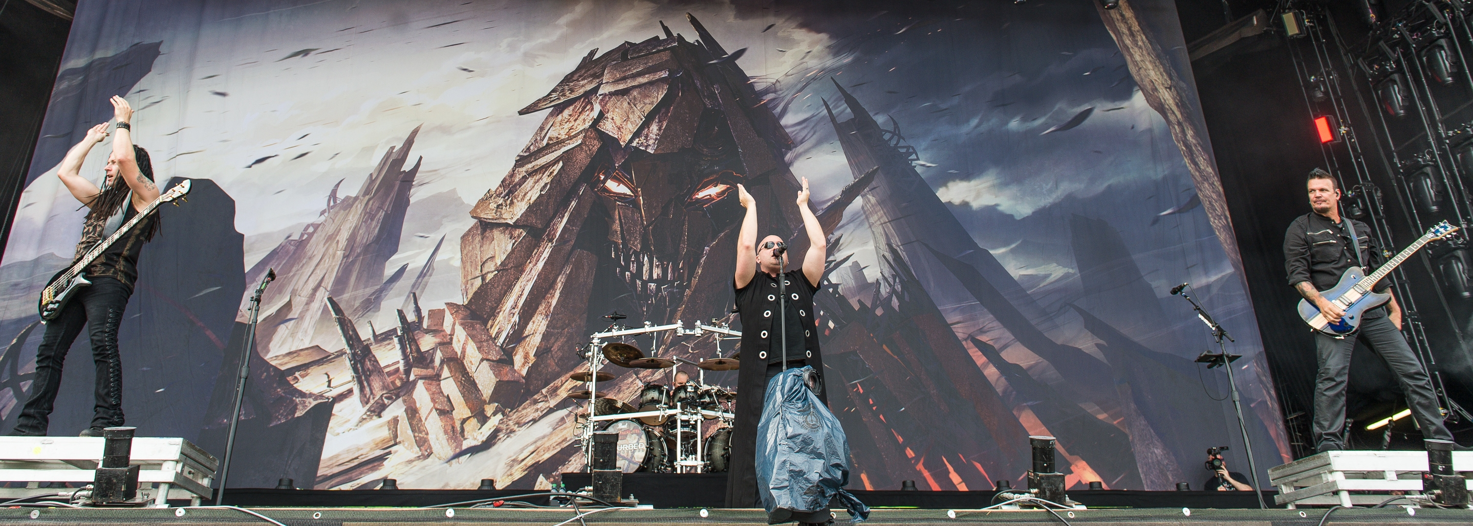 ARGO-Konzerte,Dan Donegan,David Draiman,Disturbed,Festival,John Moyer,Konzert,Livekonzert,Livemusik,Mike Wengren,Musik,RiP,Rock im Park 2016,Seat Zeppelin Stage